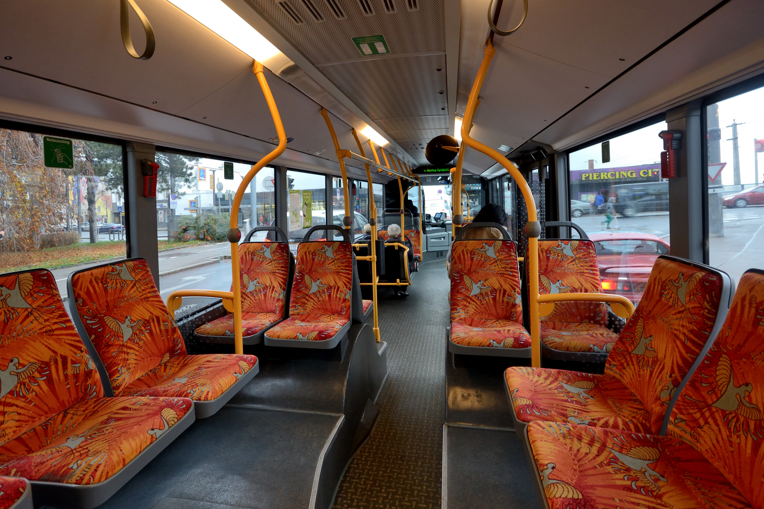 Innenraum eines Mercedes-Benz Citaro C2 von Zuklin